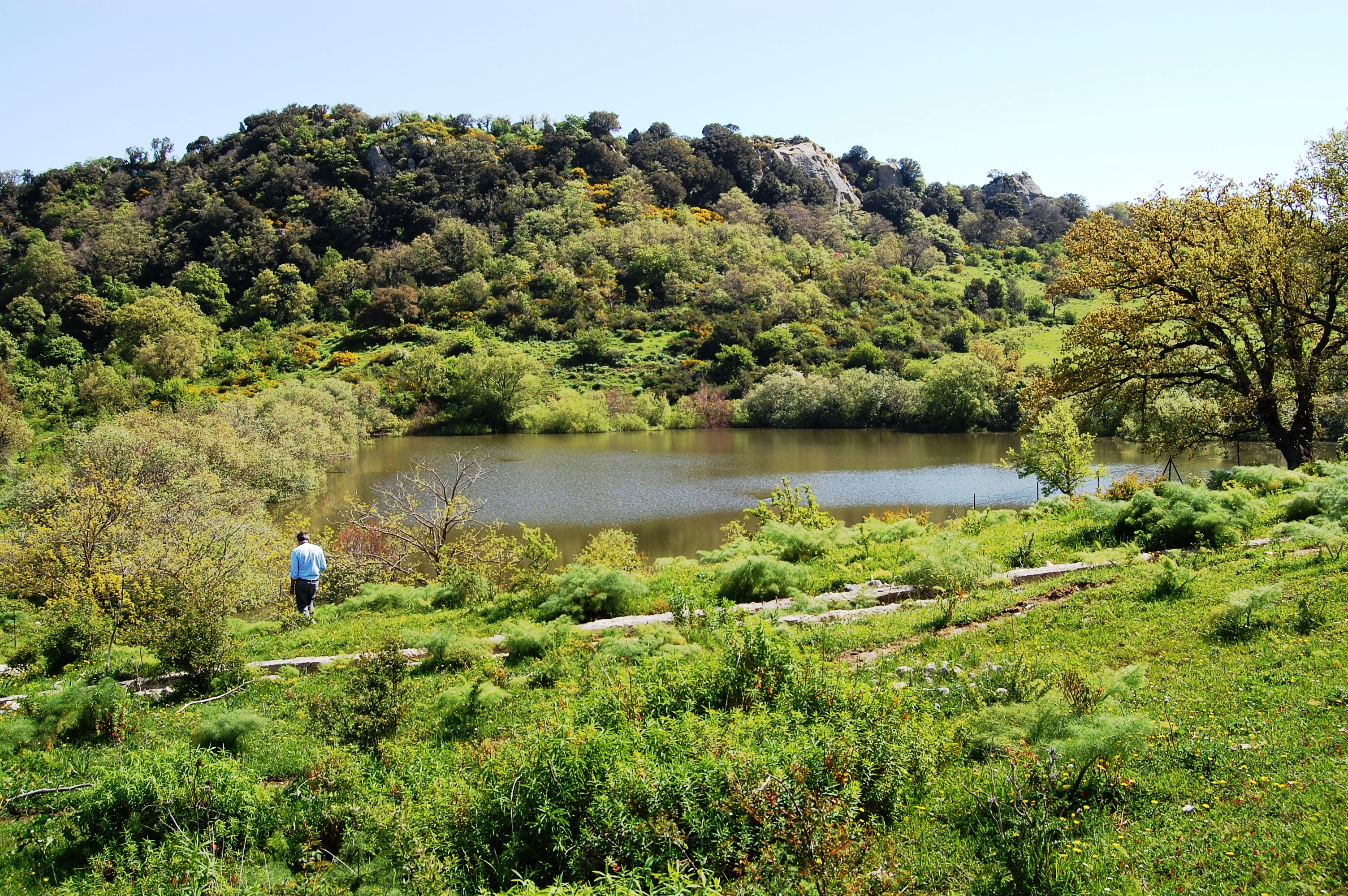 Bosco della Ficuzza, Sicily Lago Coda di riccio